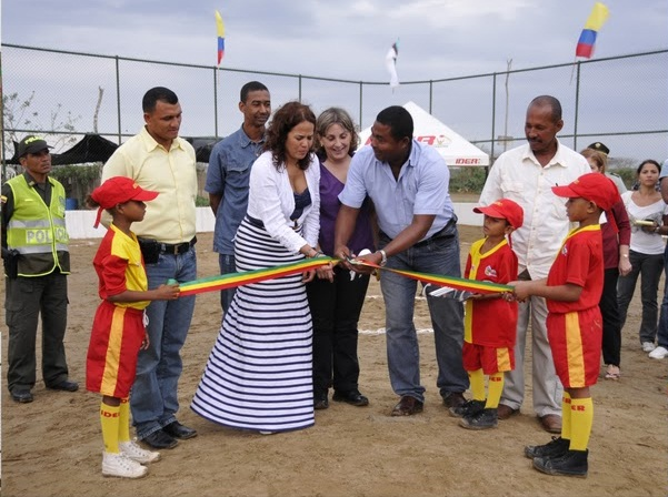 Tierra Baja Inauguración campo de Softball Febrero 2011